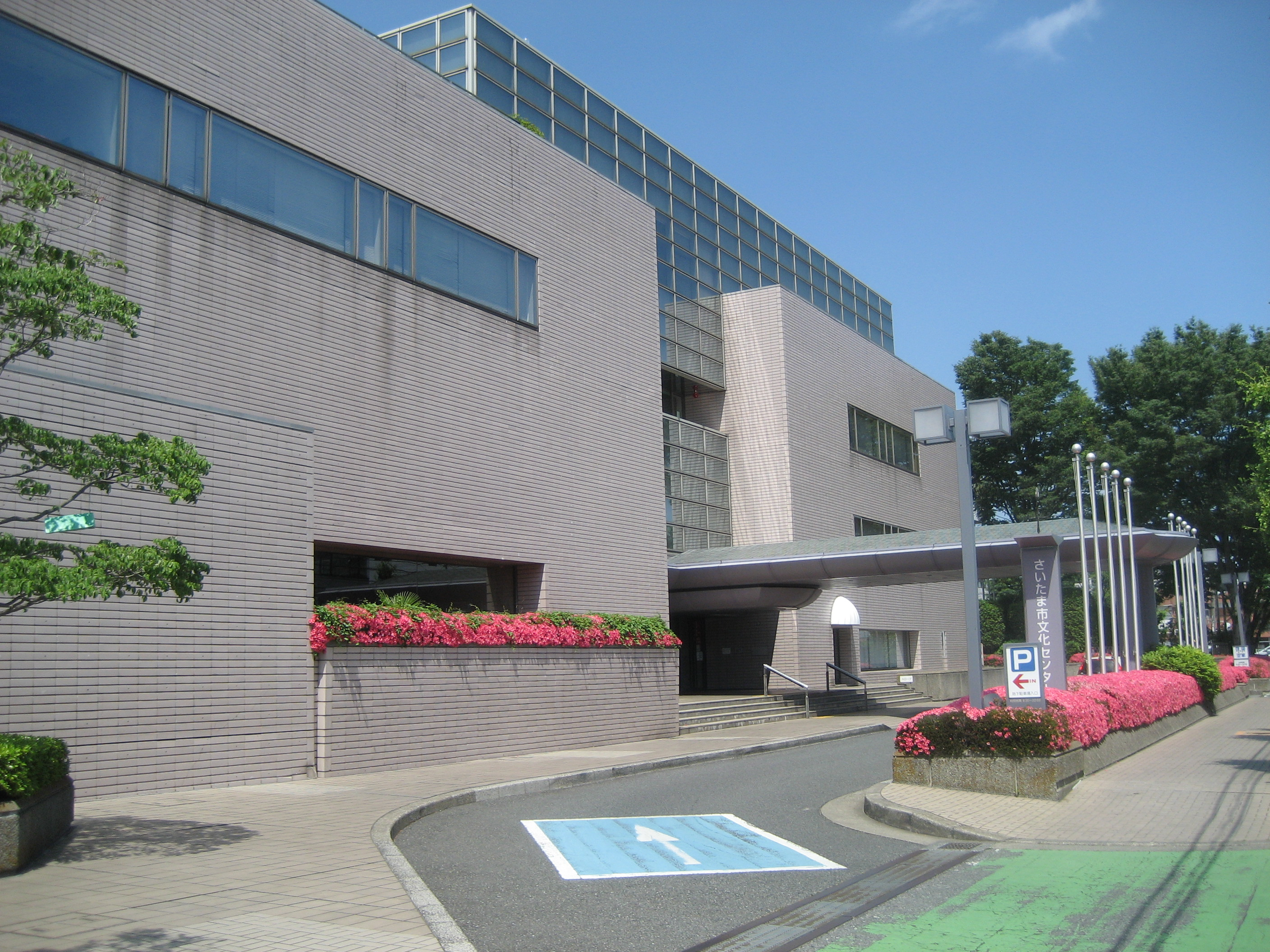 さいたま市文化センター（建物南側を撮影）